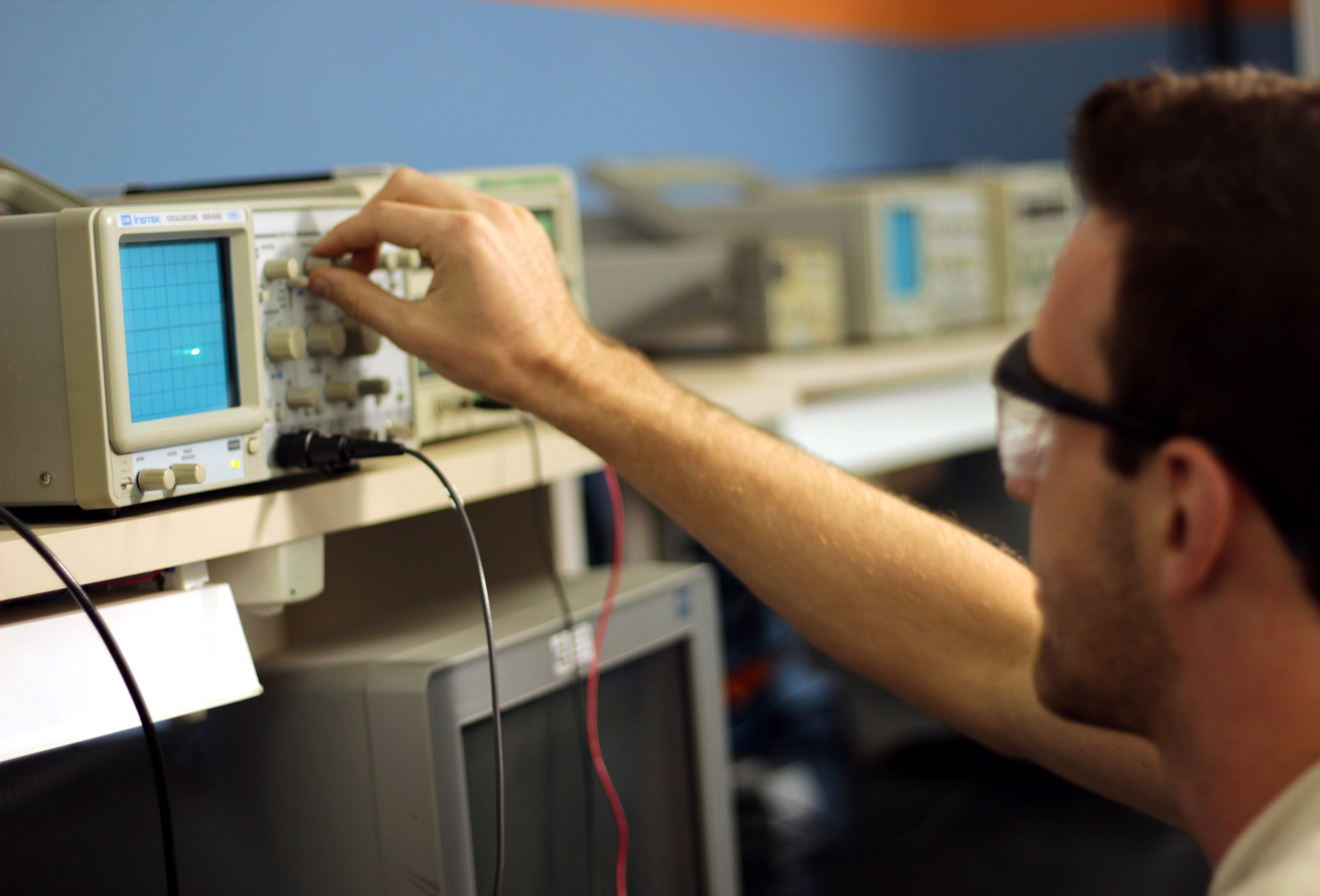 Aluno da Engenharia de Controle e Automação do Instituto Federal de Santa Catarina Campus Chapecó